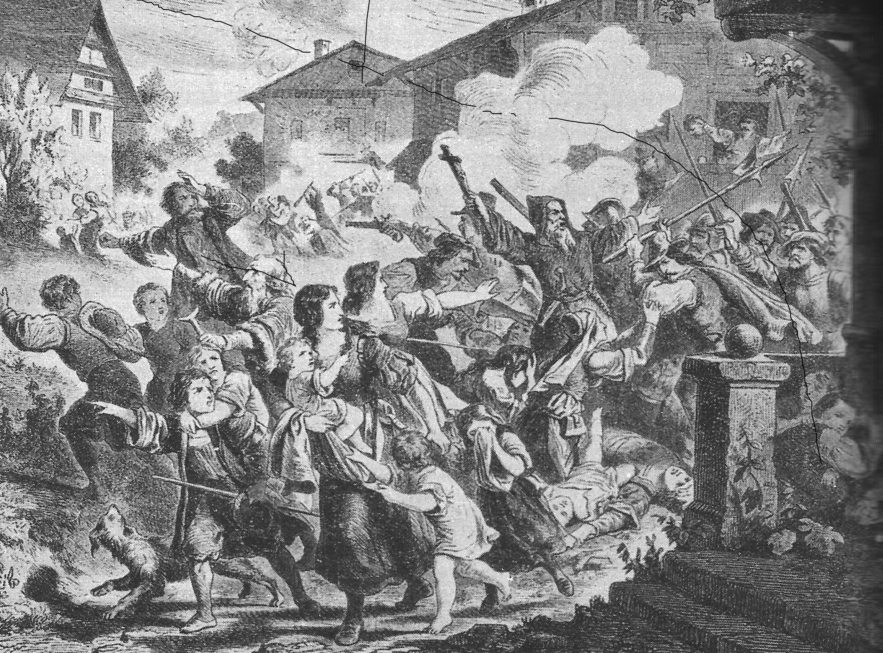 L'eccidio di Tirano (1620)